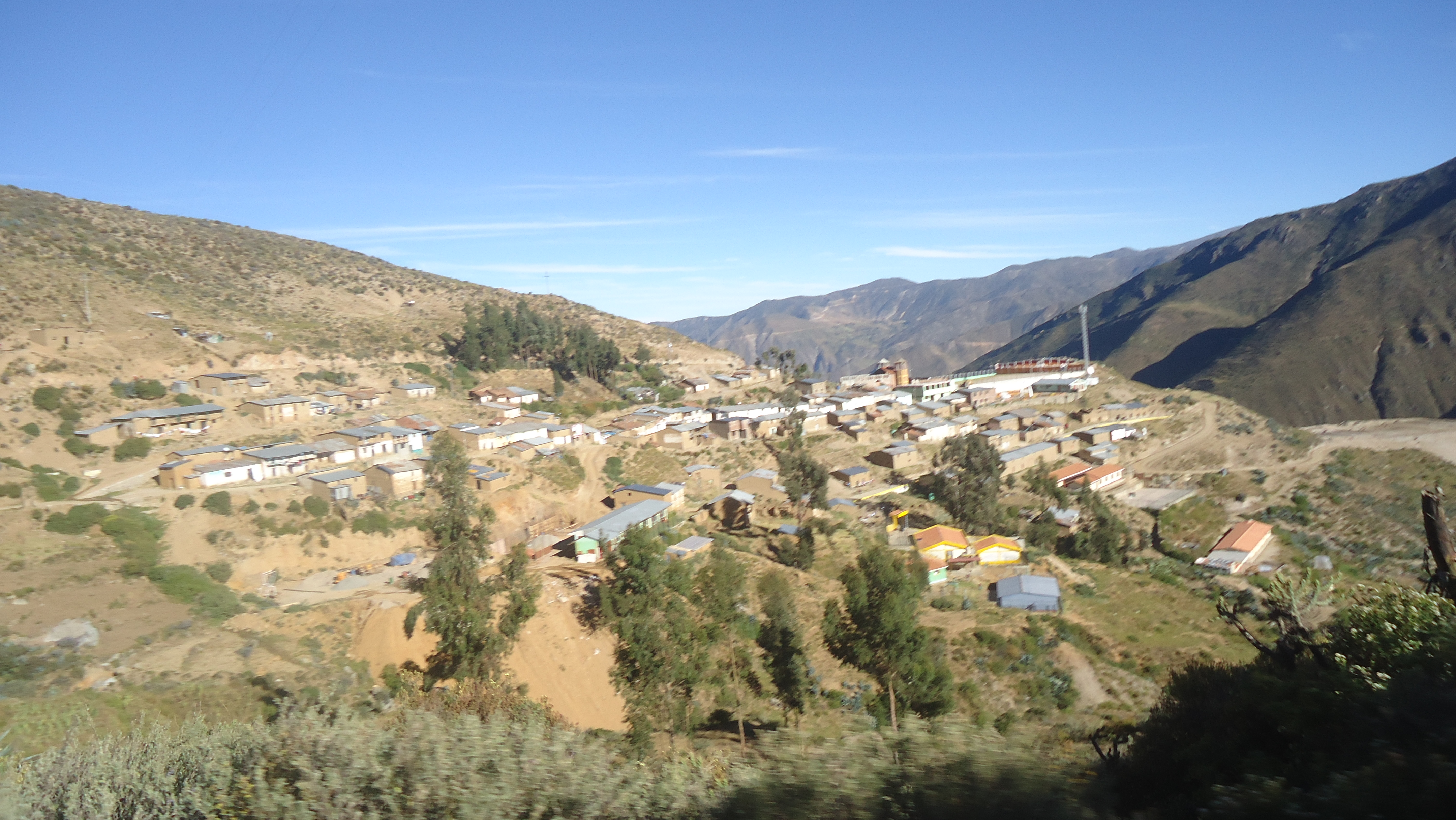 vista desde la carretera que dirige hacia Huañacancha